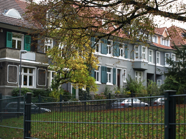 Häuserzeile auf der Nordost-Seite des Frankenplatzes in Wuppertal